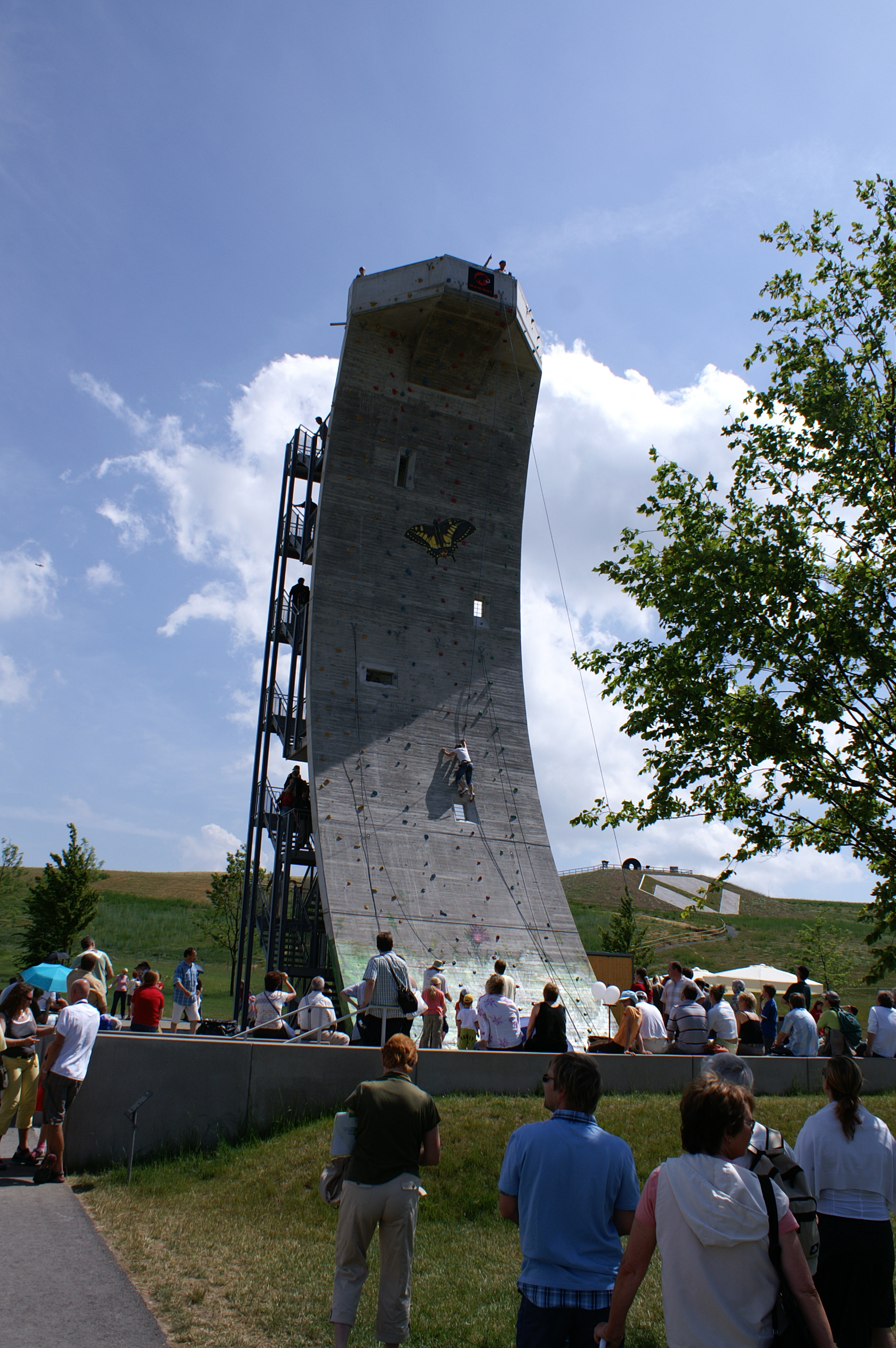 Kletterwand